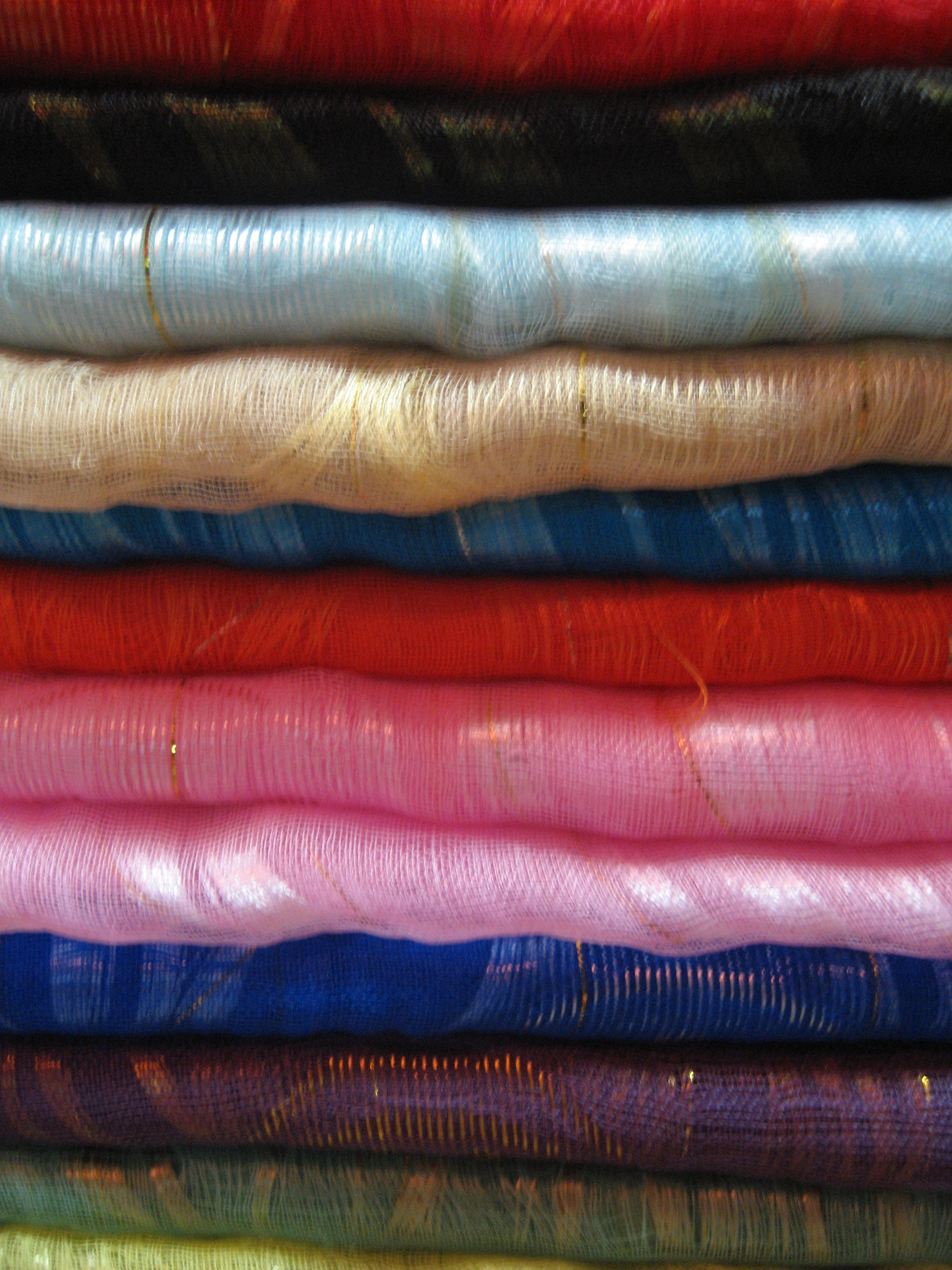 Thai silk